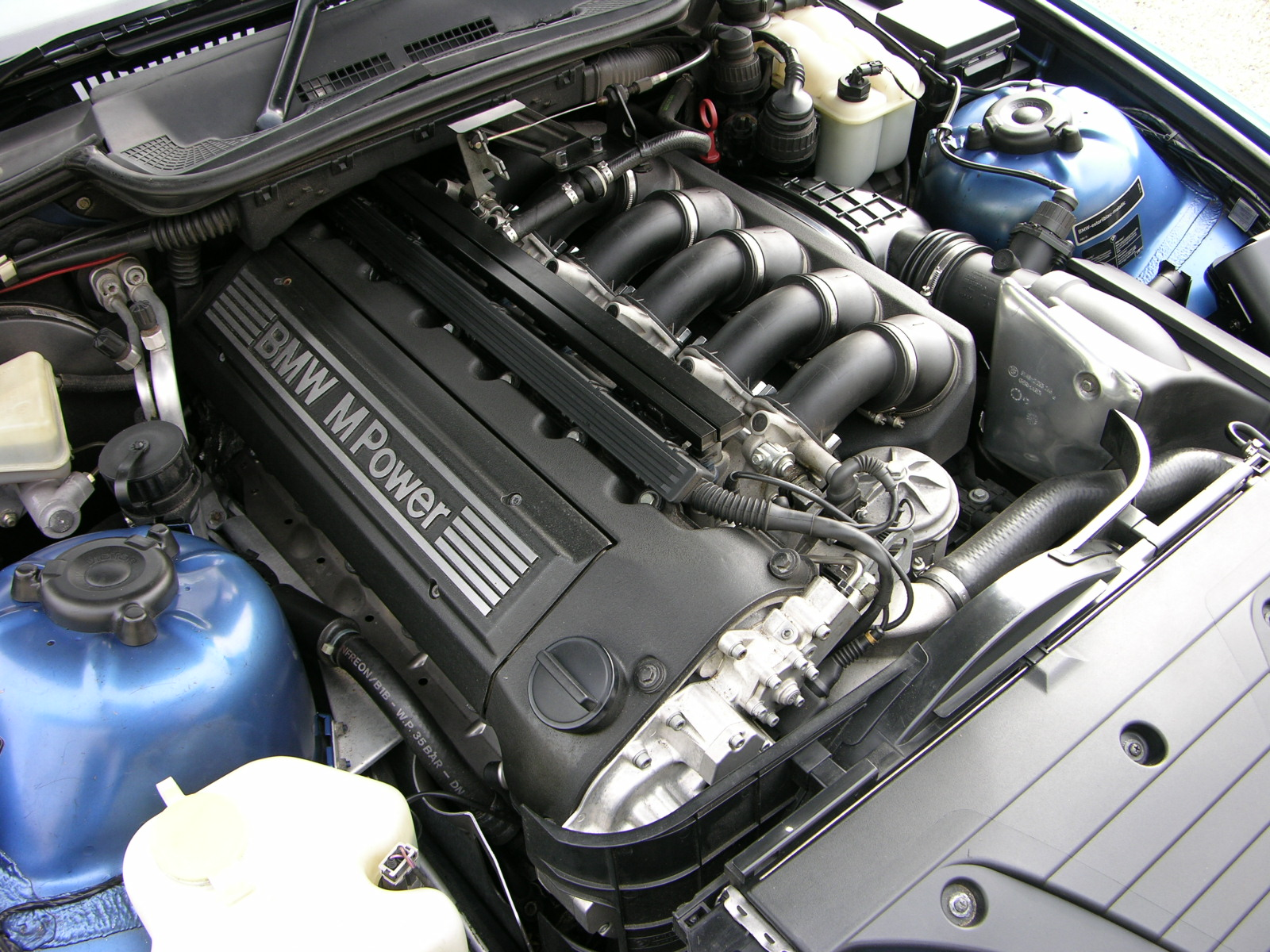 BMW M3 Evo Coupe E36